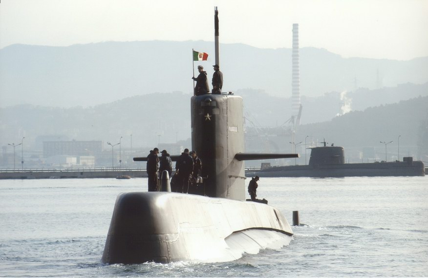 Sommergibile Salvatore Pelosi